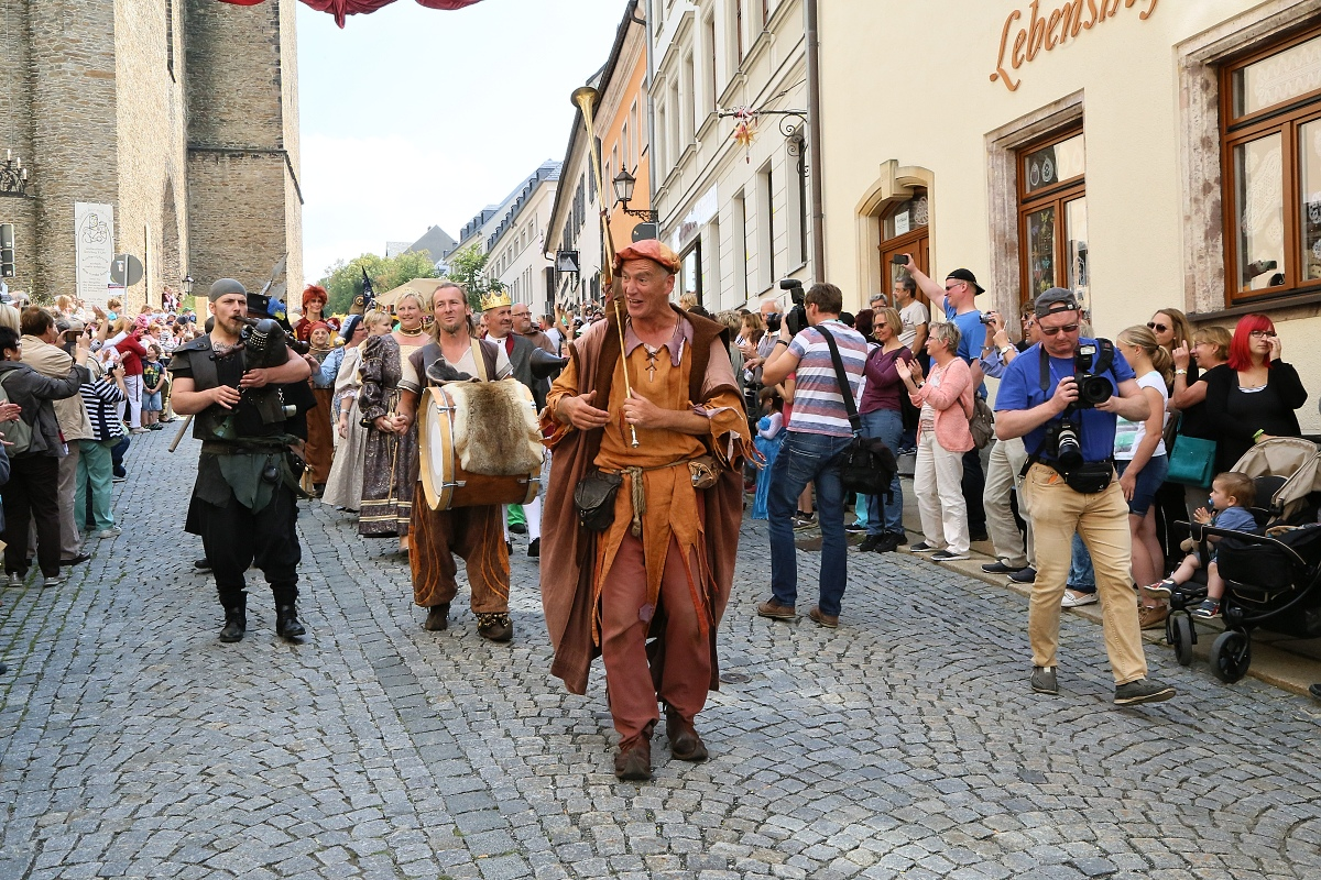 Closing Gala des Festivals Fabulix in Annaberg-Buchholz.